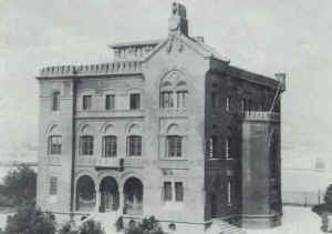 La Palazzina Florio alla Favignana.jpg Fotografia ottocentesca, l'autore è morto prima del 1934